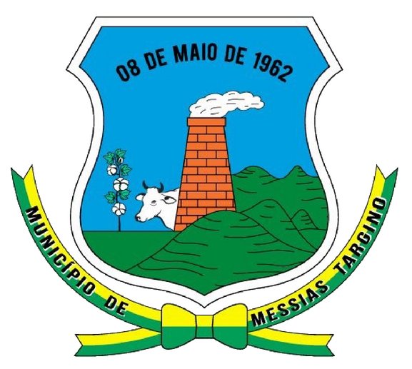 Brasão de Messias Targino